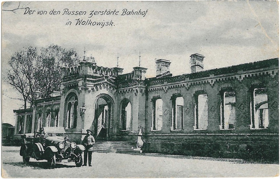 Беларуская (тарашкевіца): Ваўкавыск (Vaŭkavysk), вуліца Чыгуначная (vulica Čyhunačnaja). Станцыя Ваўкавыск Места